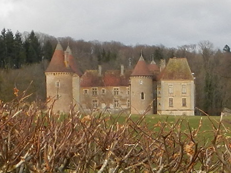 Château d'Epiry